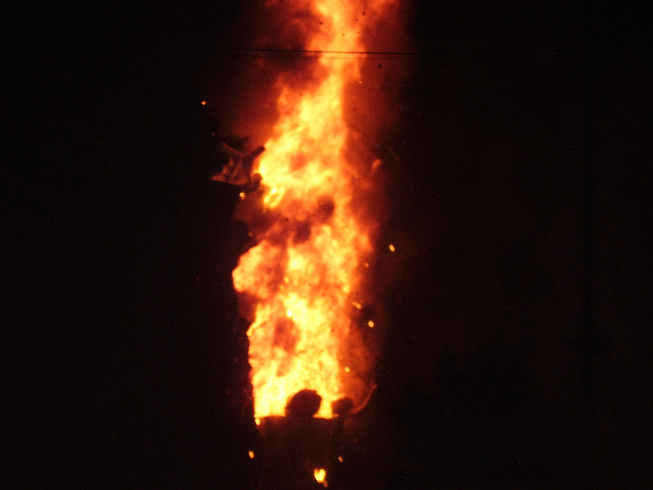 El último domingo de las fiestas de Las Torres de Cotillas y a partir de las 23:30 se inica el espectáculo piromusical del espectáculo de la Quema del Raspajo que concluye con dicha quema.